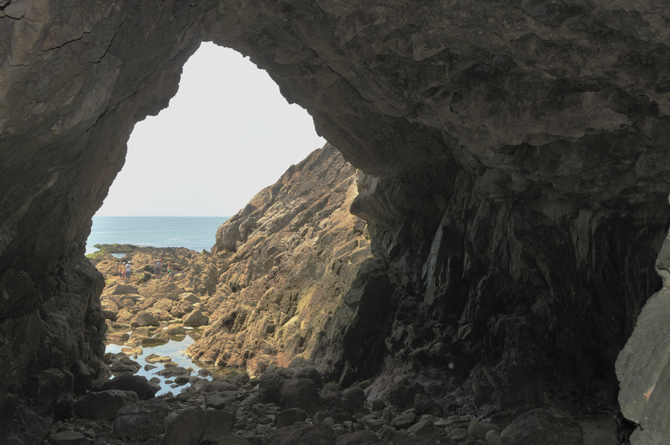 Grotte des Korrigans, Le Pouliguen, Loire-Atlantique, France L'ouverture sur l'océan Atlantique (vers le sud), vue de l'intérieur